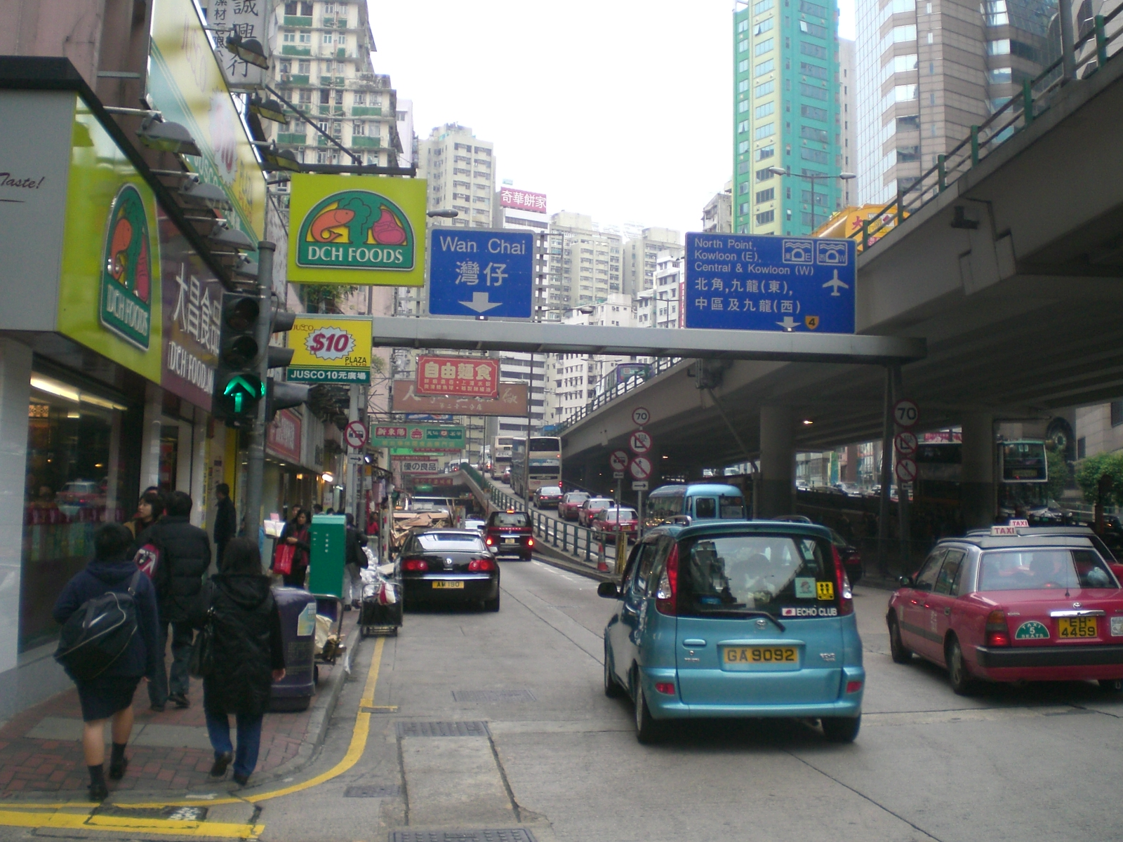 堅拿道天橋, 高架道路, Canal Road, Causeway Bay, Hong Kong.